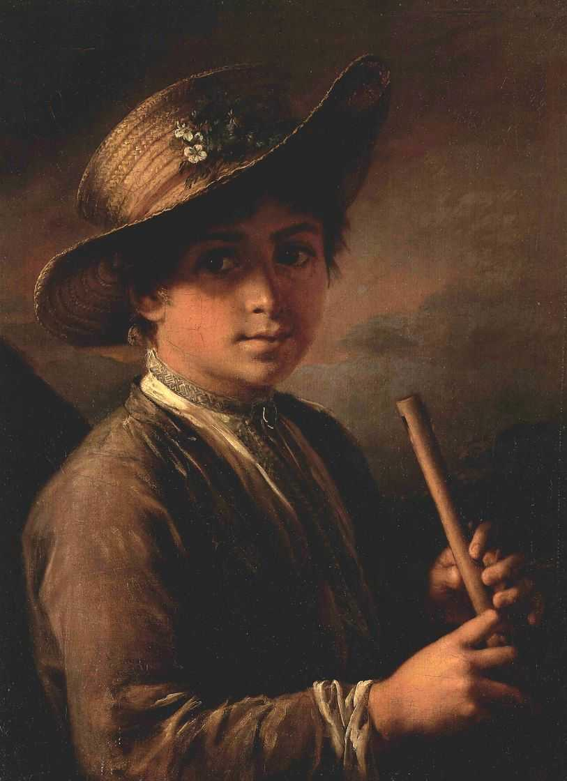 МАльчик с жалейкой